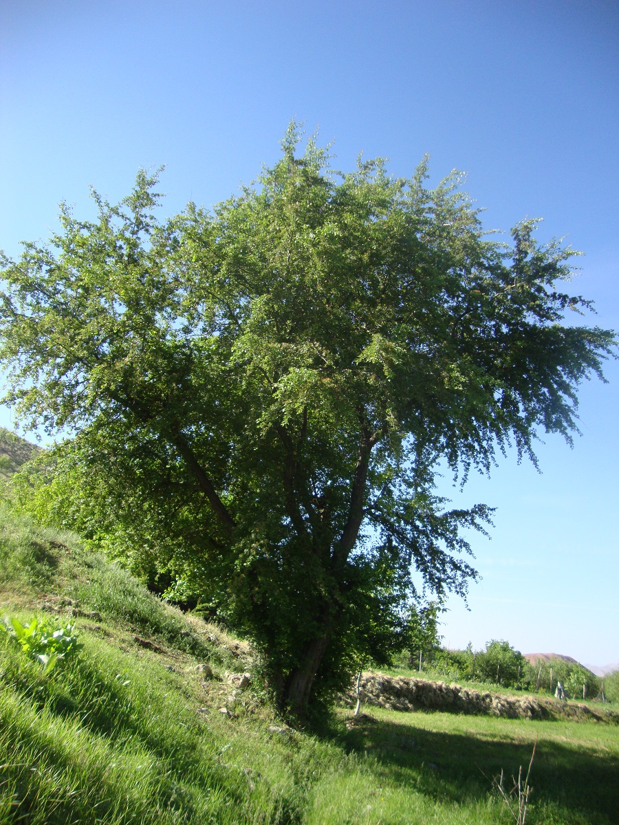 درخت بید از درختان منطقه کوهستانی روستای جهان اسفراین احمد نیک گفتار- اسفراین